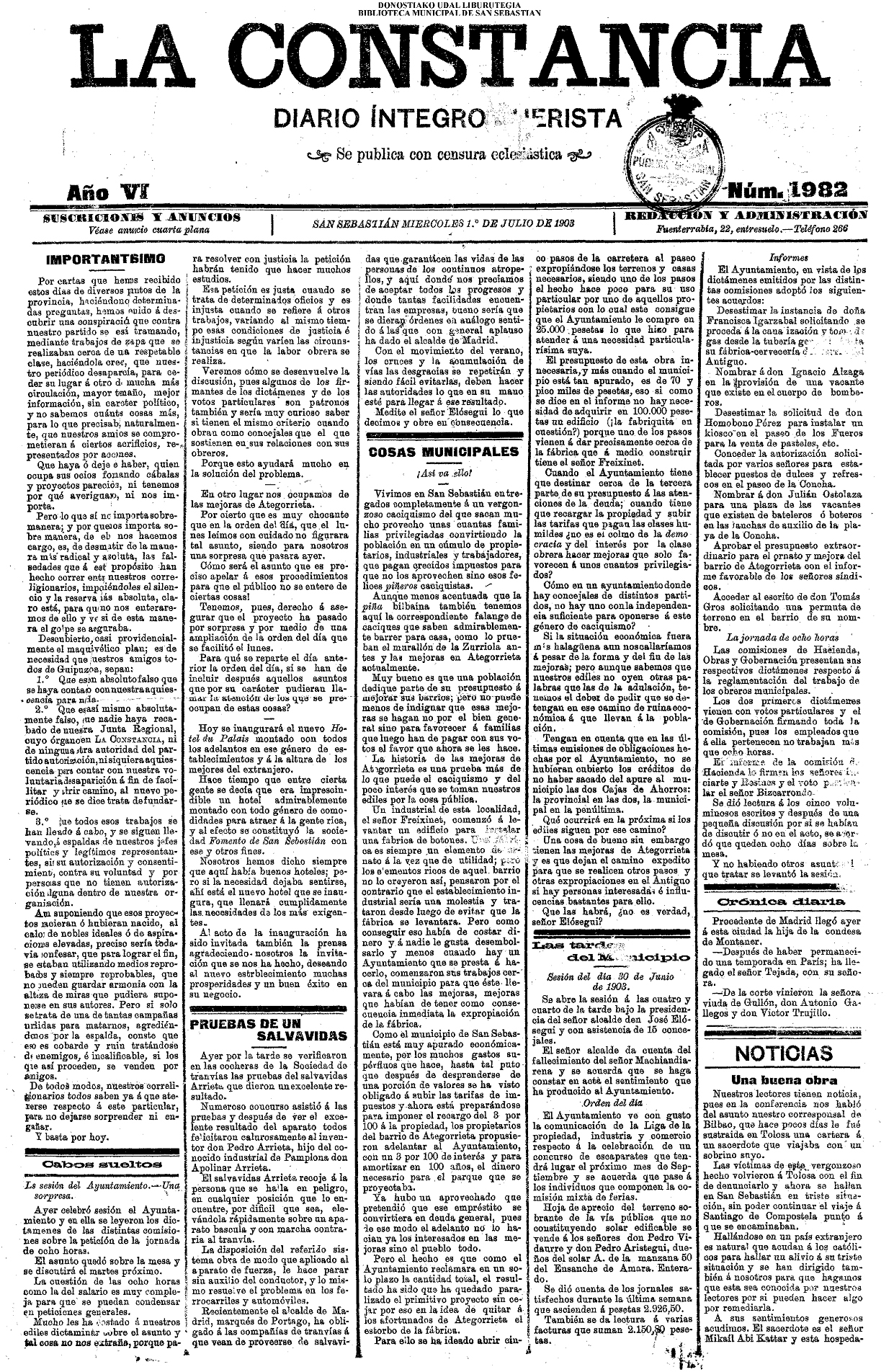 Portada del periódico La Constancia.